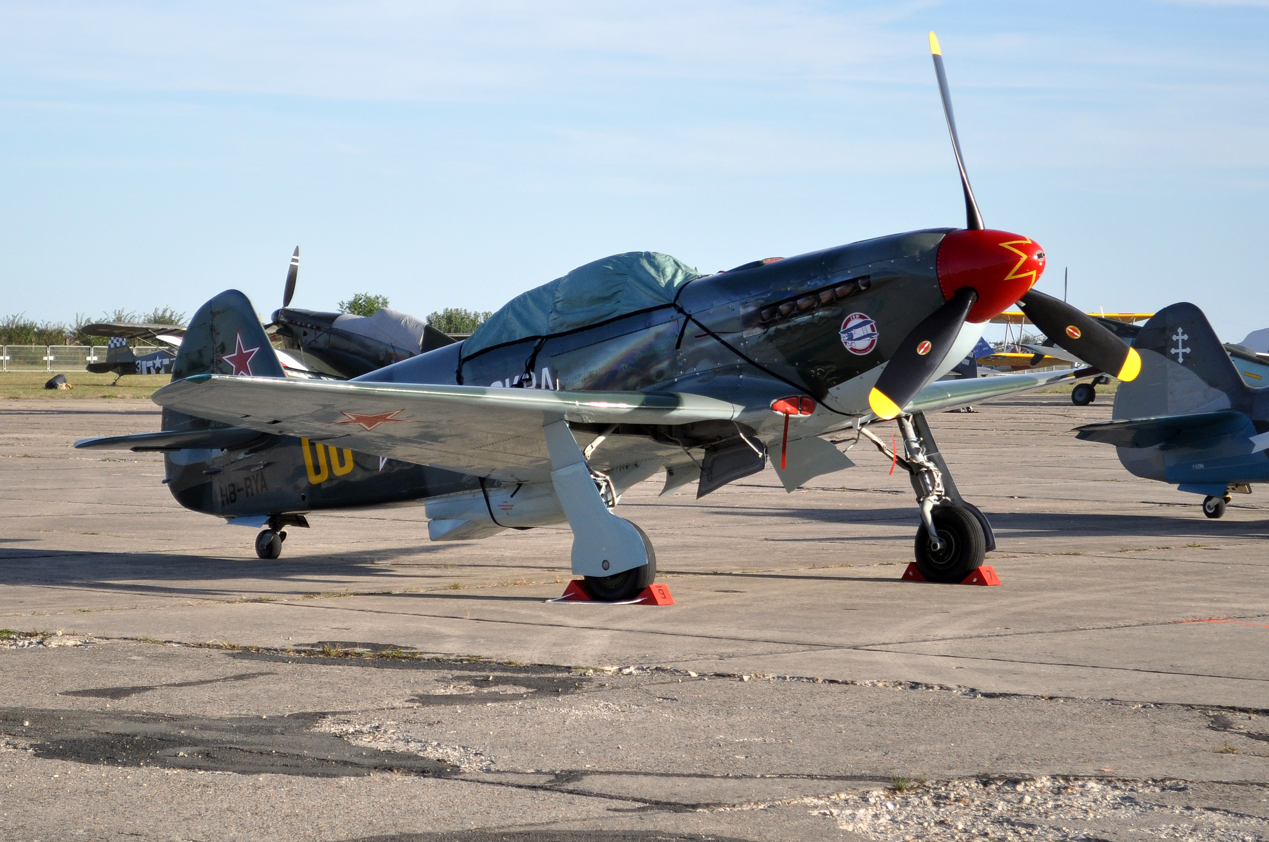 MSN 047046